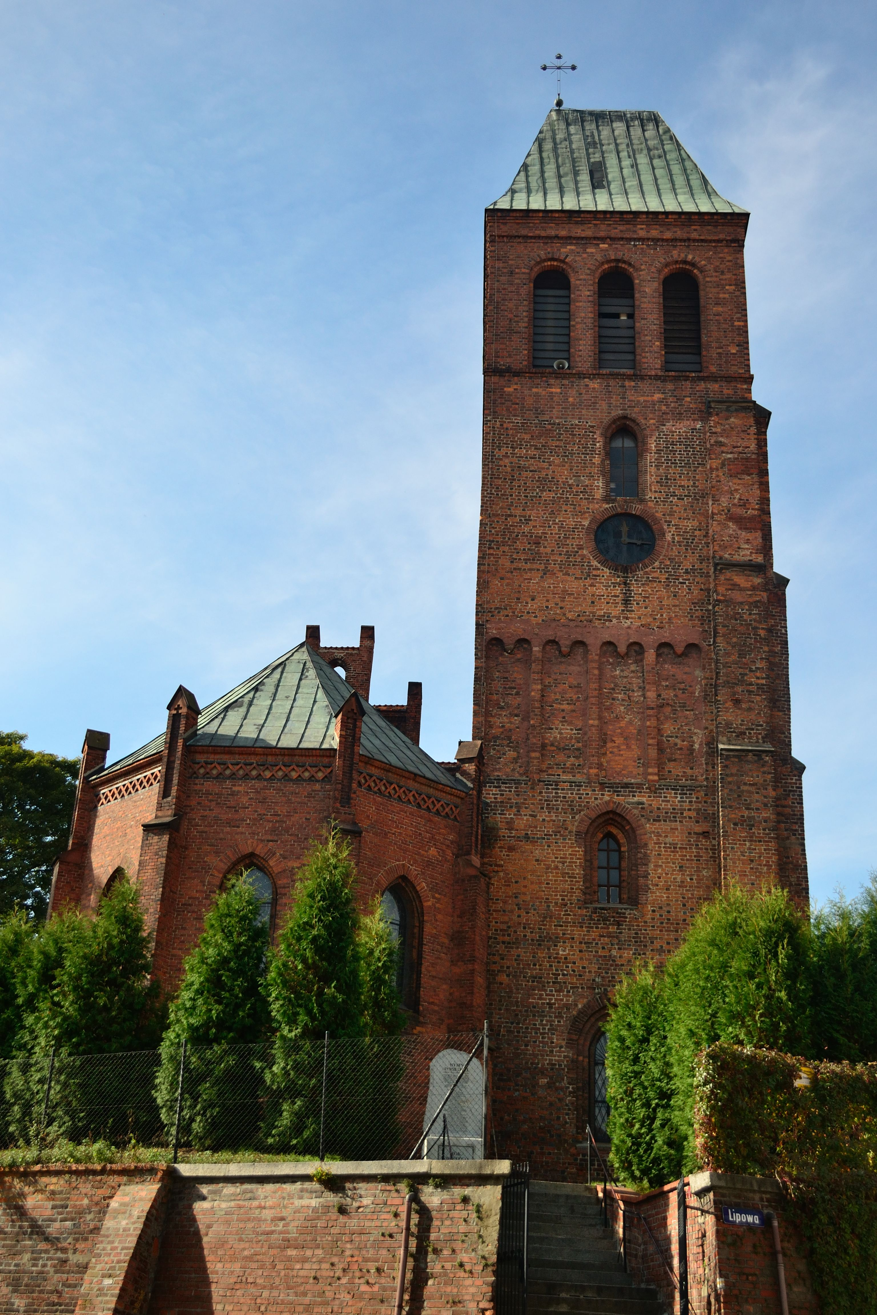 trzebnica, ul. Drzymały 1 - kościół pomocniczy pw. św. Piotra i Pawła (zabytek nr A/3861/703/W)